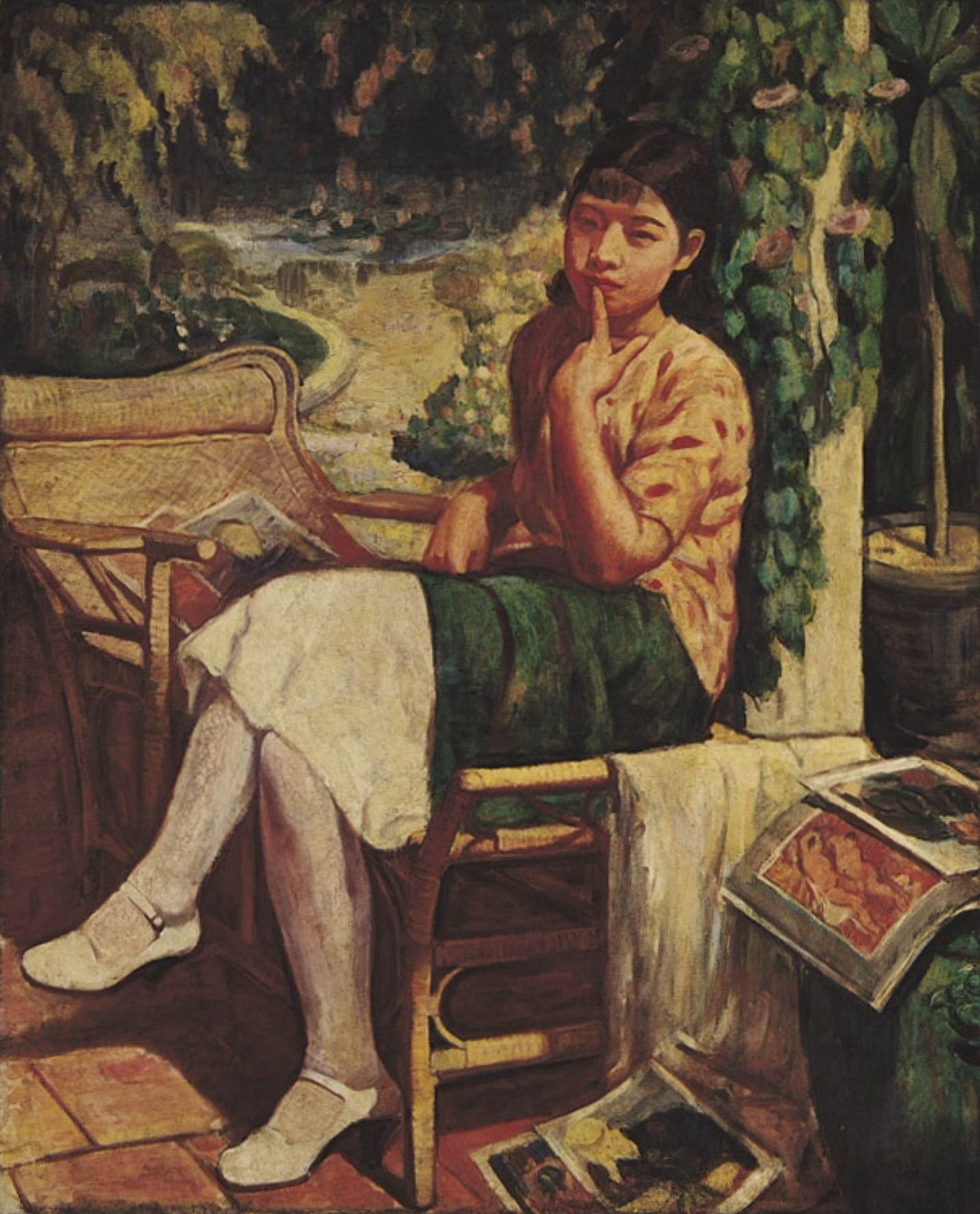 李梅樹常常畫自己的子女或親族好友，除了方便之外，就是多了一分親切感。《小憩之女》所畫的便是侄媳婦劉曾妹(哥哥劉清港之子劉山田的太太)。一位二十多歲的少婦，坐在躺椅上休息，姿態優雅，著絲襪及高跟鞋，左手食指輕點朱唇，彷彿訴說著青春年華的種種氛圍，令人欣賞！前景有西洋名家雷諾瓦、梵谷的畫片，背景營造出深度的空間感。《小憩之女》一作獲得1935年第九屆臺灣美術展覽會特選第一席，並榮獲臺展賞最高榮譽。